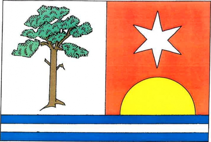 vlajka, Borová, okres Svitavy